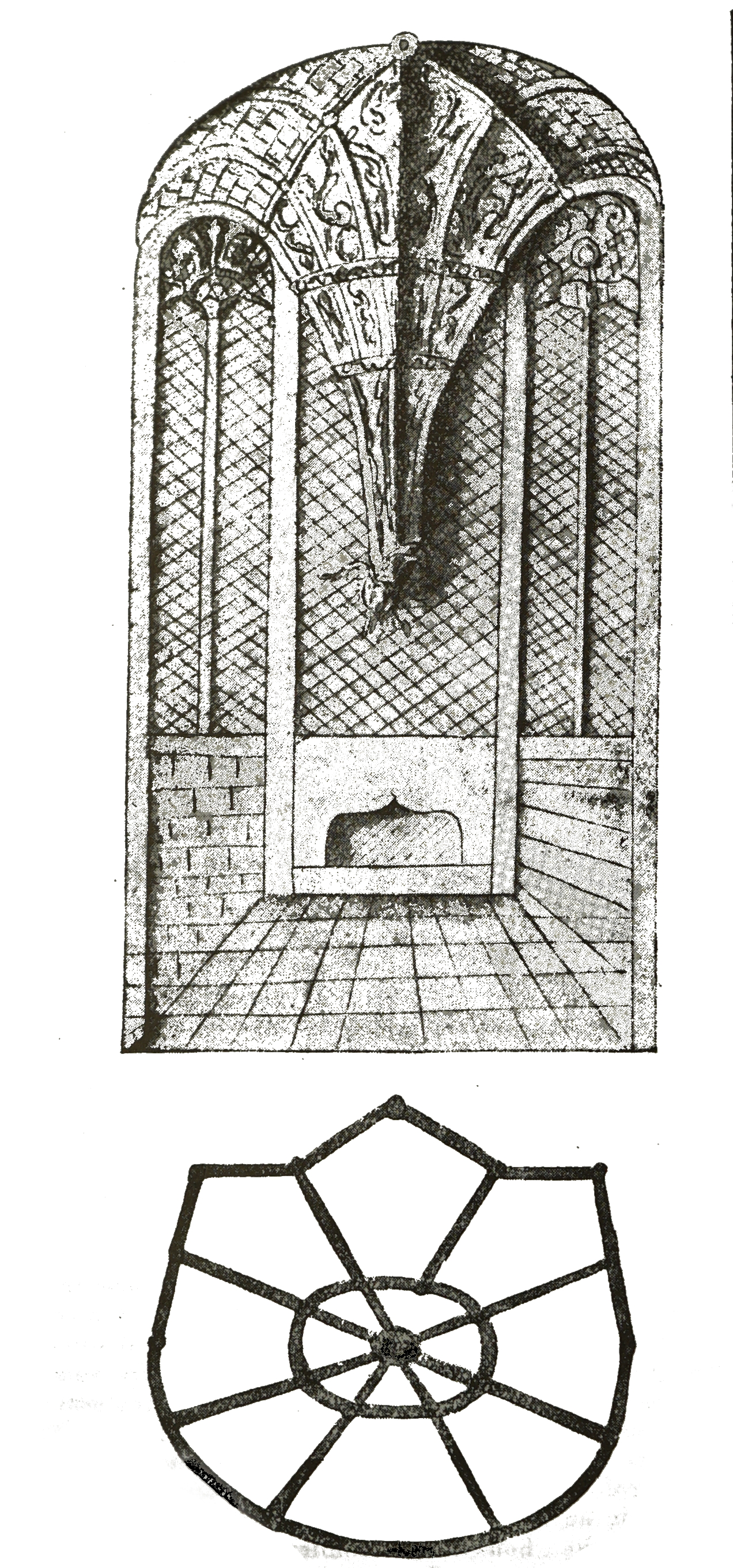 description dans le titre.